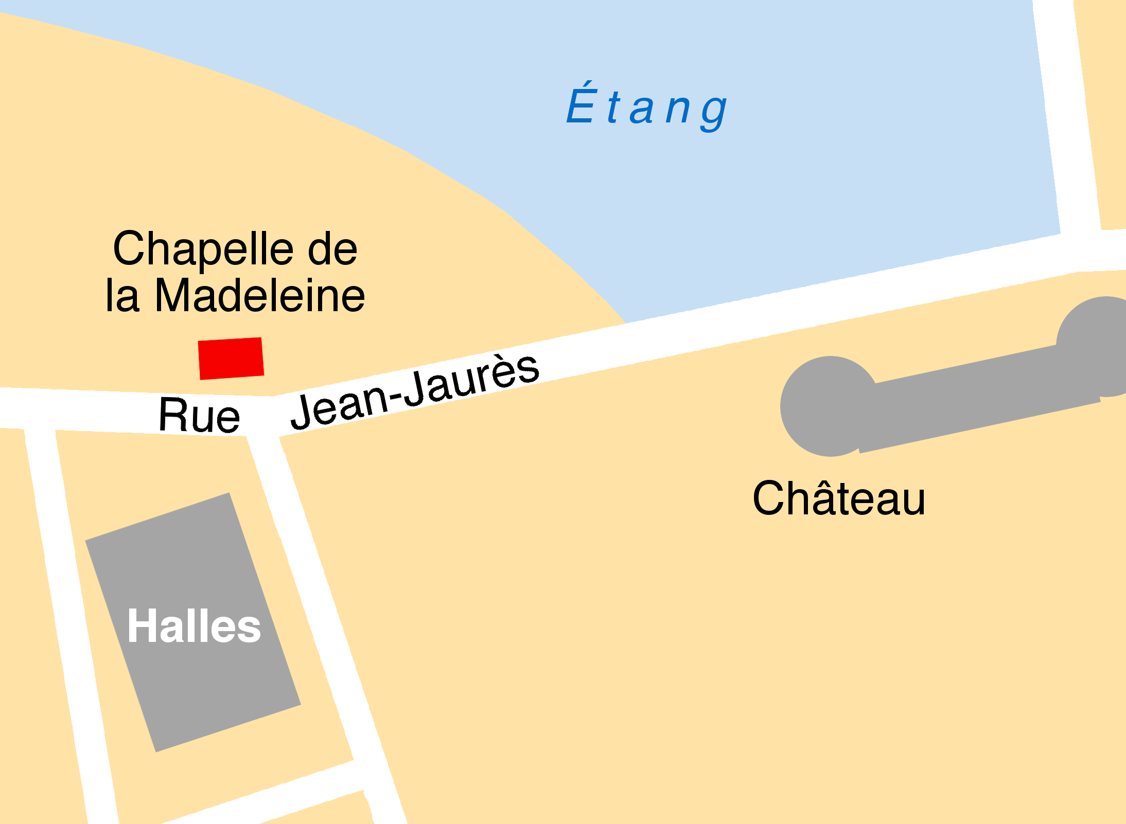 Détruite en 1970, la chapelle de la Madeleine se trouvait à Pont-l'Abbé, dans le Finistère, en Bretagne. Son emplacement était celui de l'actuel numéro 4 de la rue Jean-Jaurès, comme on peut le voir sur les photos anciennes, notamment dans Rémy Pencrec'h, Pierrot Campion, Pont-l'Abbé de ma jeunesse, Brest, Le Télégramme, 2003, p. 12, 28 et 30, et sur une vue aérienne 6136 du 1er janvier 1969.